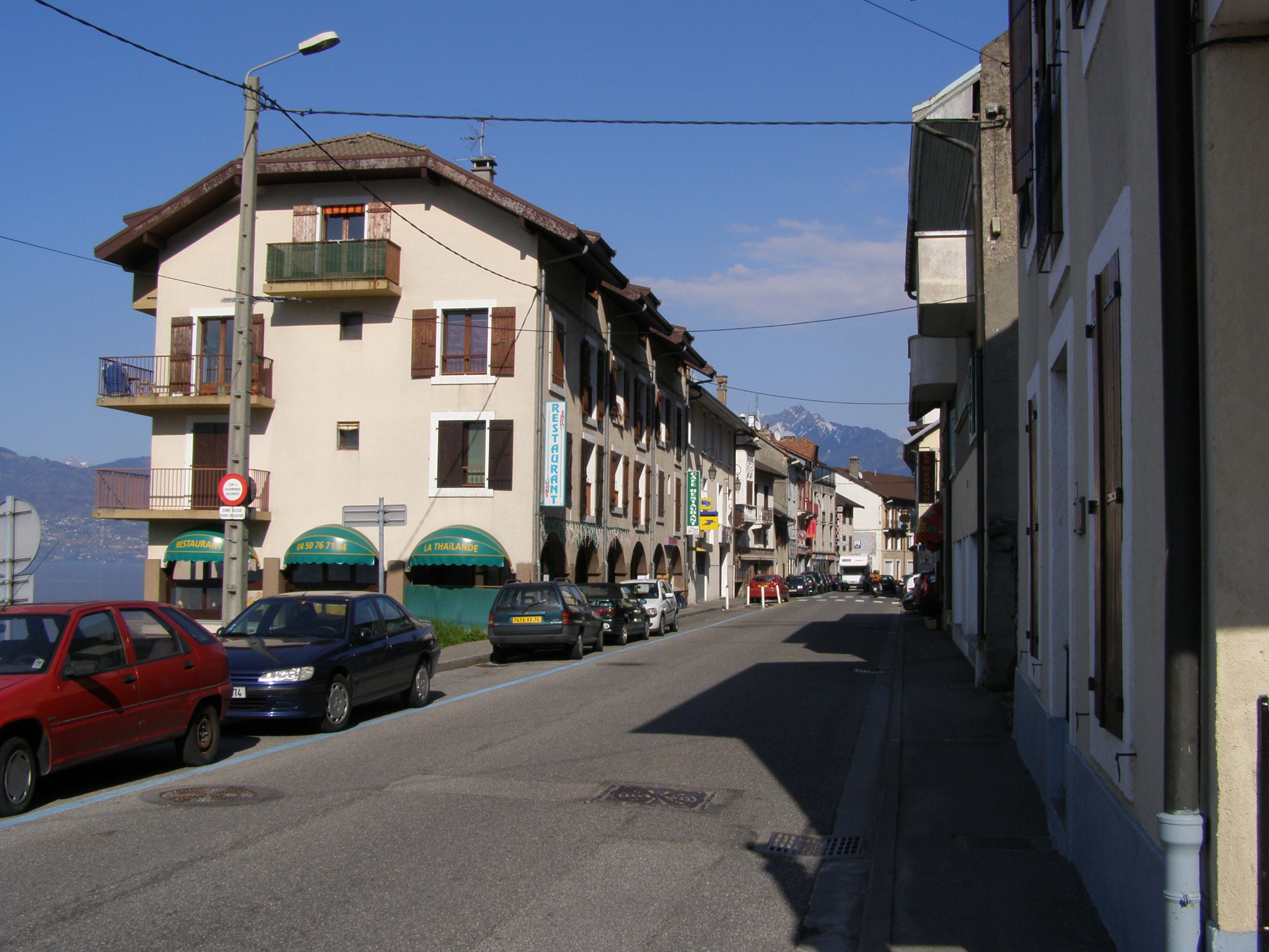 Rue Nationale à Saint-Gingolph